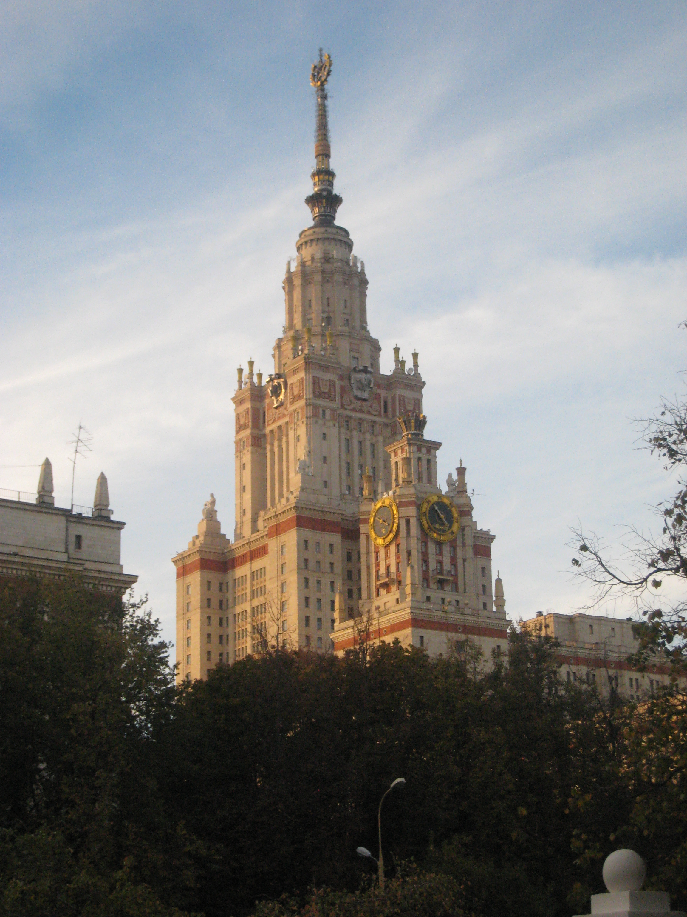 На территории Московского Государственного Университета